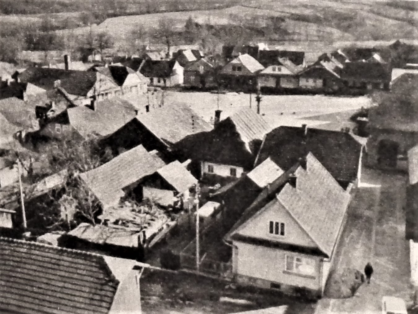 Rynek w Lipnicy Murowanej z lotu ptaka.